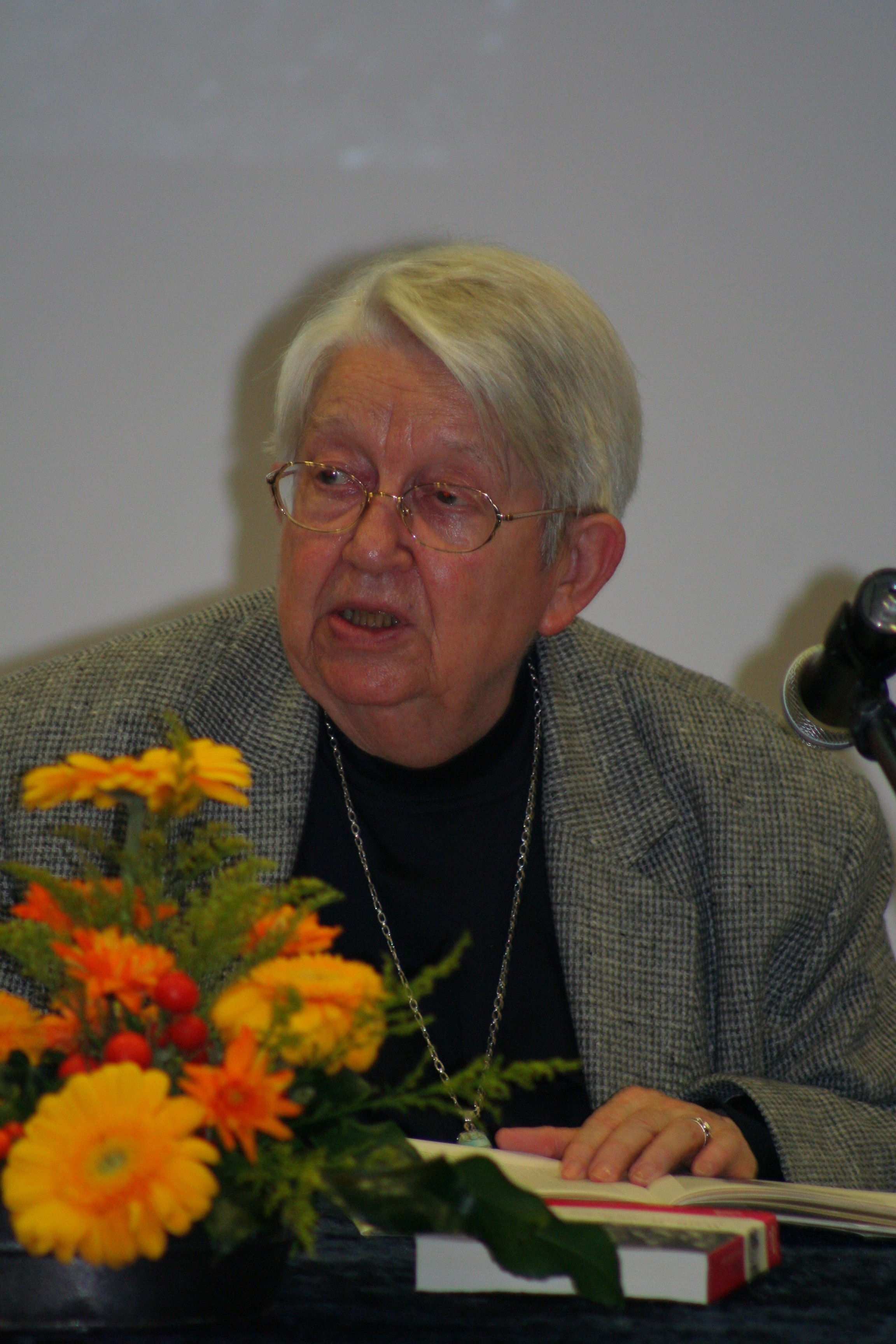 Historikerin Helga Grebing bei einer Buchpräsentation in Düsseldorf. November 2009